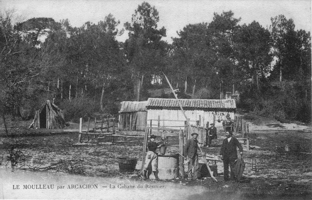 « Le Moulleau par Arcachon (Landes) - La cabane du résinier ». On reconnaît le gemmeur-résinier à son échelle à cale-pieds (pitey) et à sa hache (hapchot).